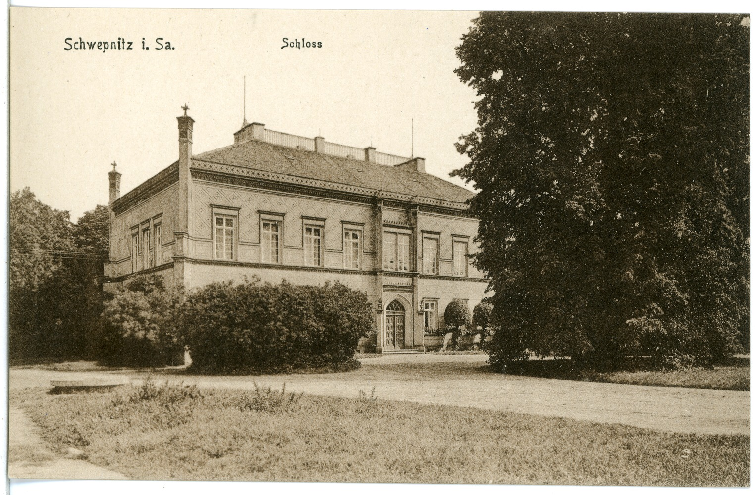 Schwepnitz; Schloß This postcard is from publisher Brück & Sohn in Meißen ( postcard has a unique number 19581 and is available in a higher resolution at the publisher. This images was uploaded in a cooperation project between Wikipedians and the publisher.